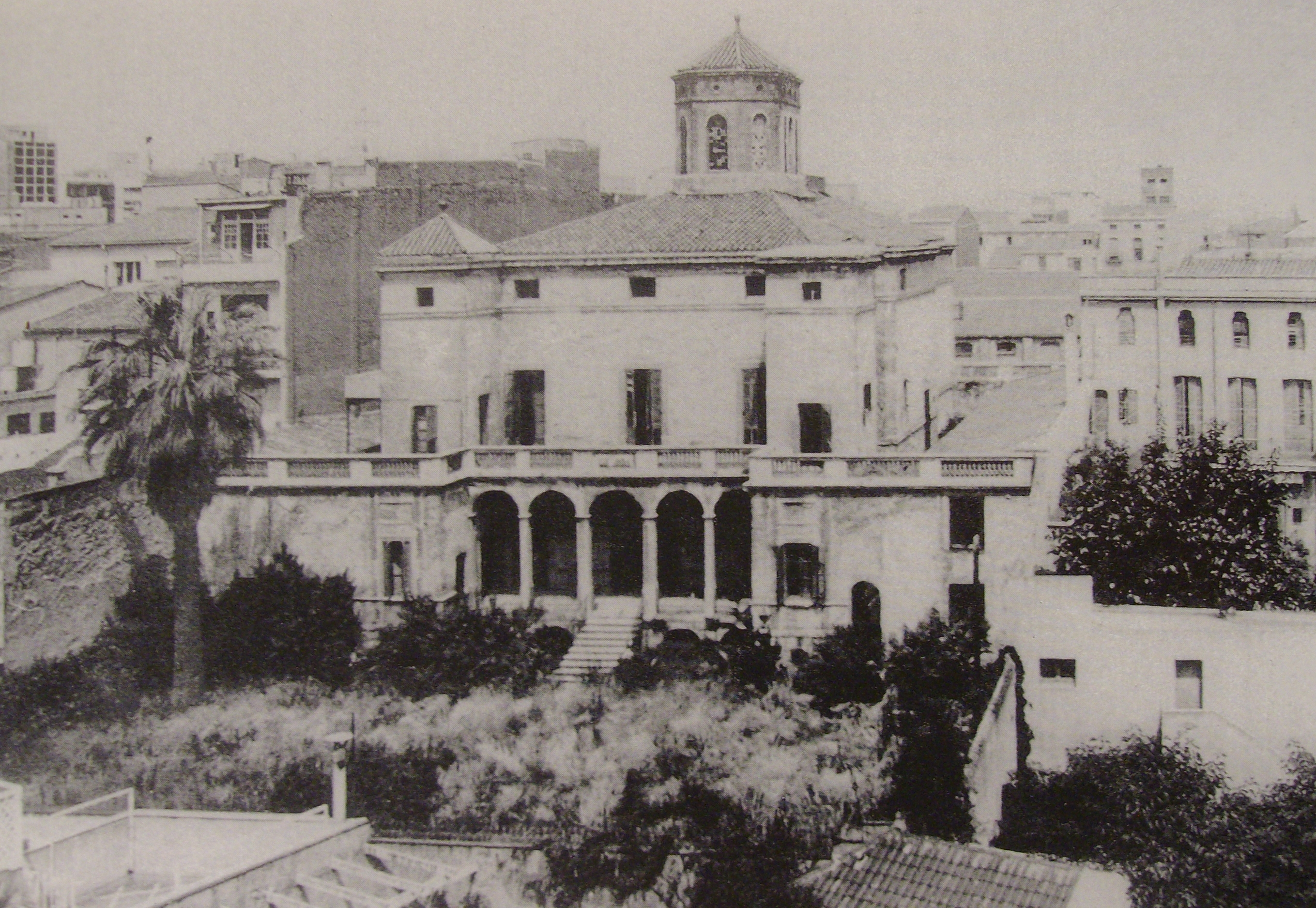 Antigua casa de Joan Fontanet i Pont (vista posterior y jardines), que por motivos de herencia de su nieto Francesc Barata, años más tarde se conocería como Casa Barata. La casa fue construida en 1865 por Gabriel Batllevell i Tort y estaba situada en la calle Sant Josep, 22, de Sabadell, Barcelona. Fue derruida en 1976, al año siguiente se construyó en su lugar un casal de ancianos.